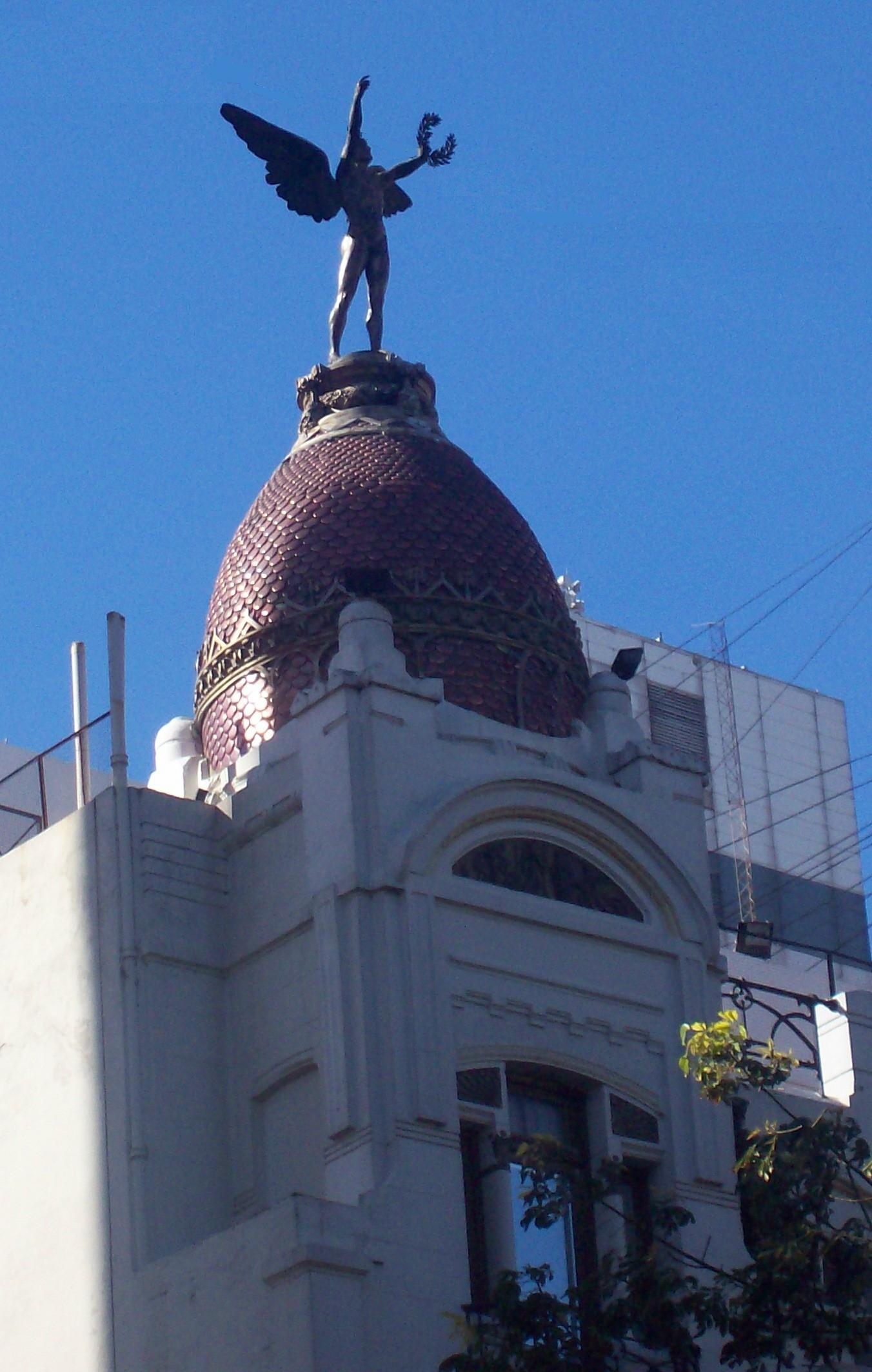 Cúpula del Club Español, en Buenos Aires, coronada con la escultura “El genio alado” del escultor barcelonés Torcuato Tasso y Nadal (1852-1935)